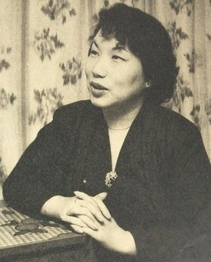 淡谷のり子